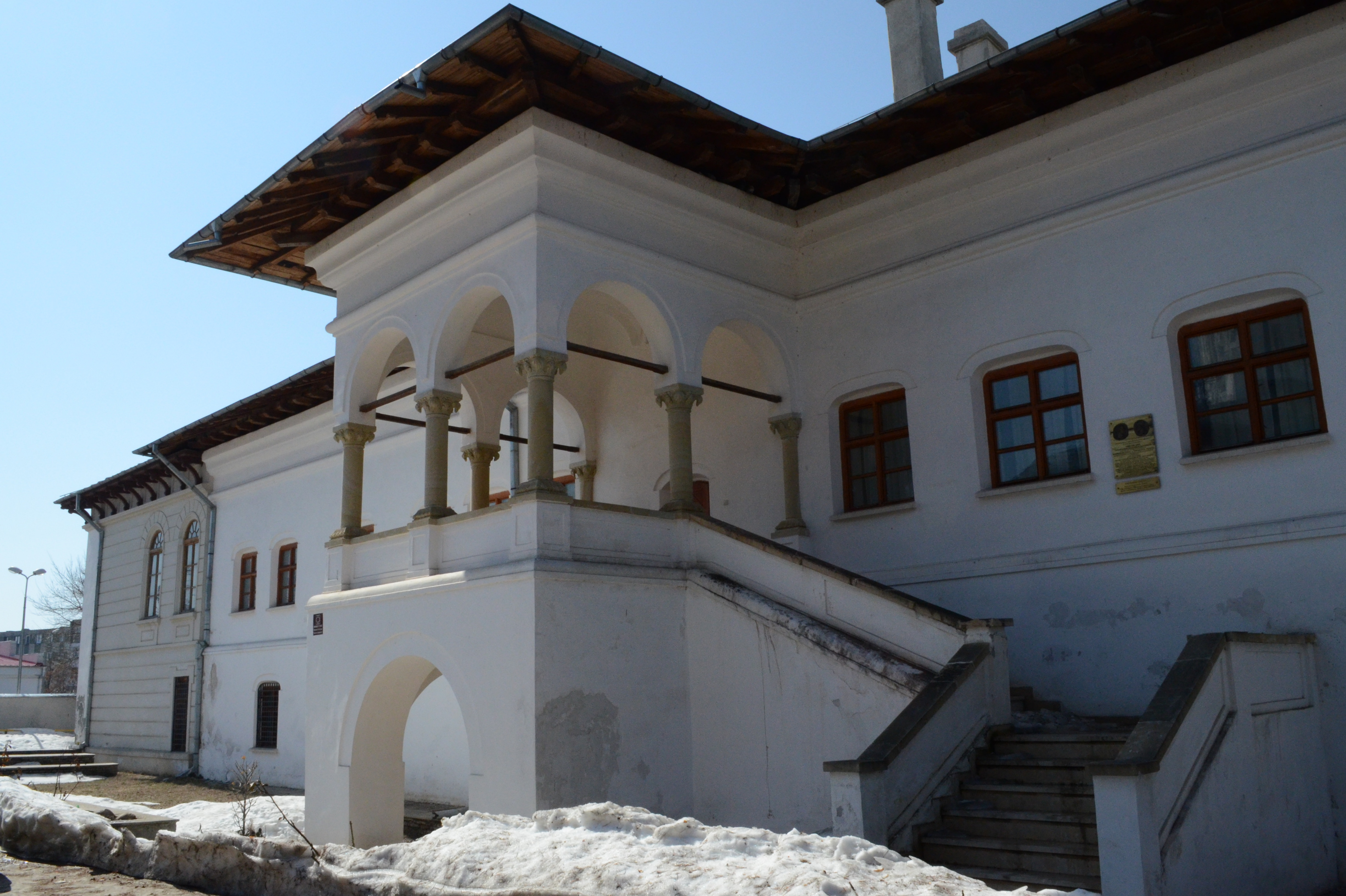 Casa Domnească, Râmnicu Sărat 02